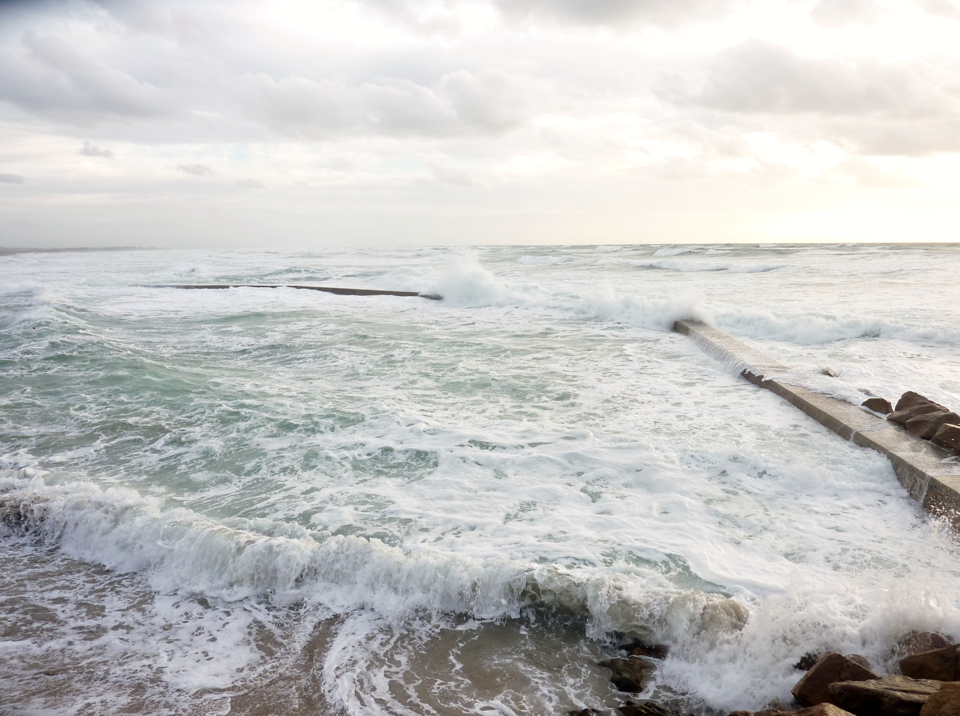 Vagues submergeant les digues du port de Penhors lors d'une mer forte avec marée de fort coefficient